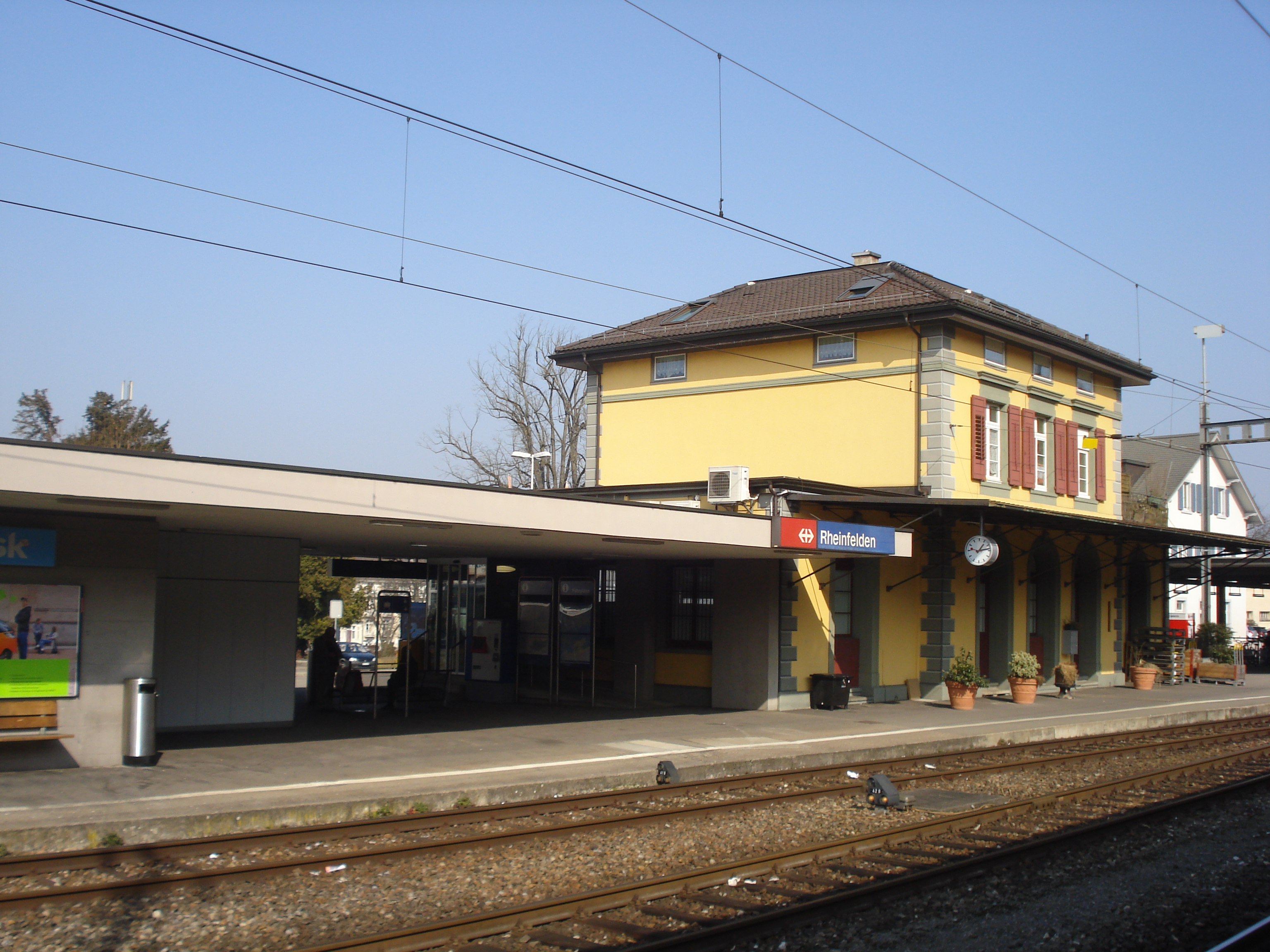 Gare de Rheinfelden (Argovie).